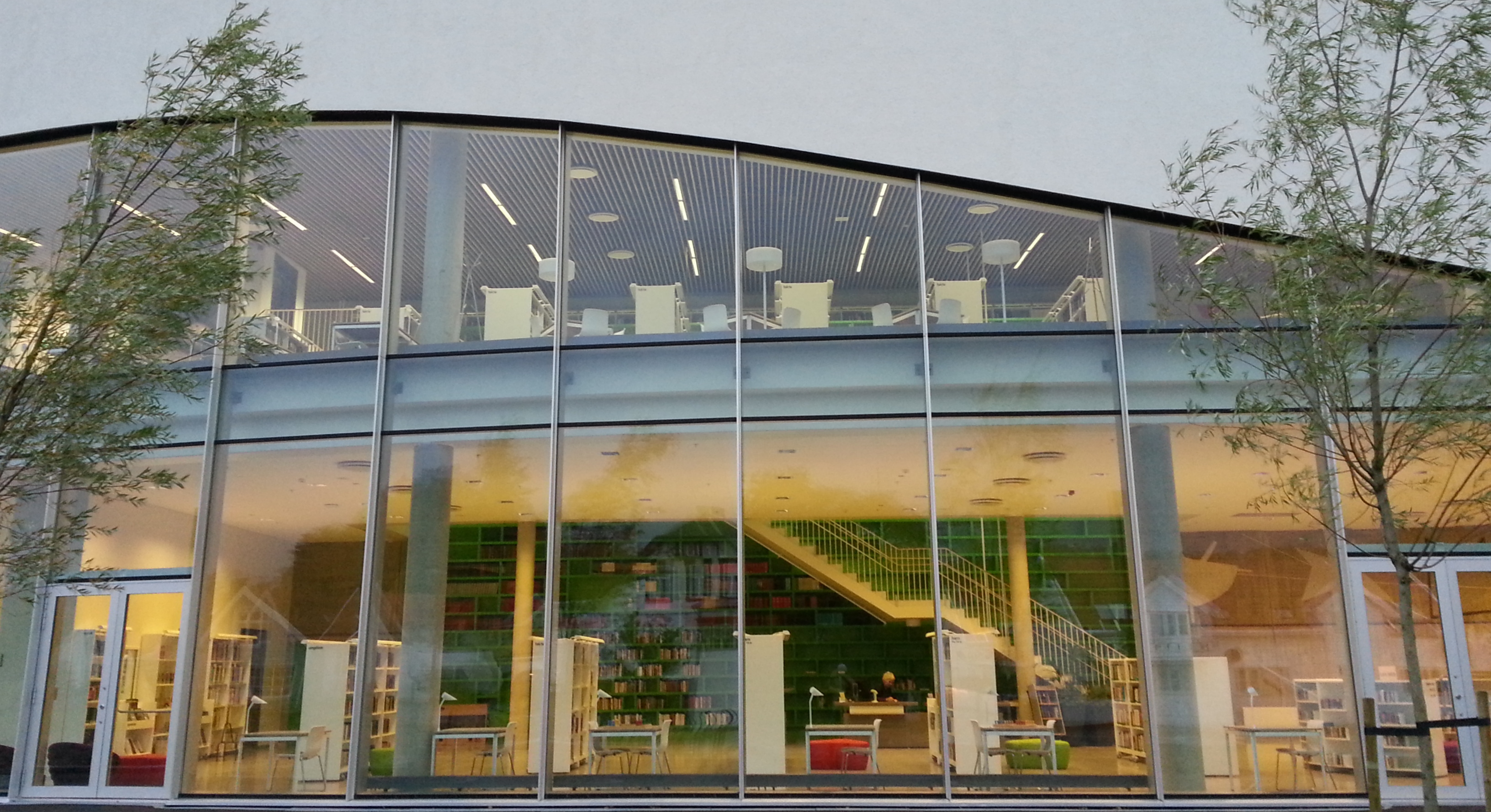 Mandal bibliotek i Buen kulturhus sett fra utsiden